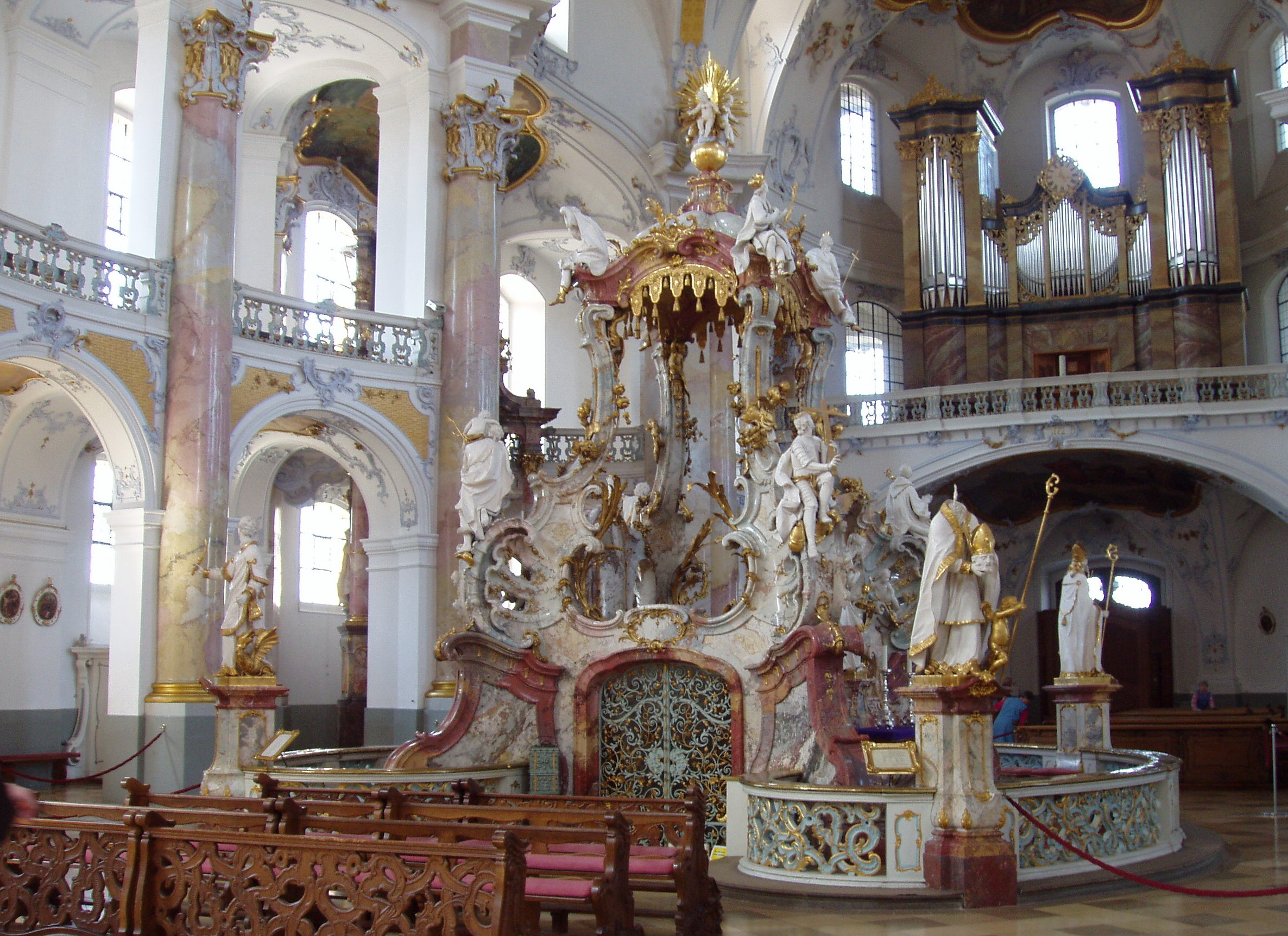 Vierzehnheiligen-Autel : photo personnelle